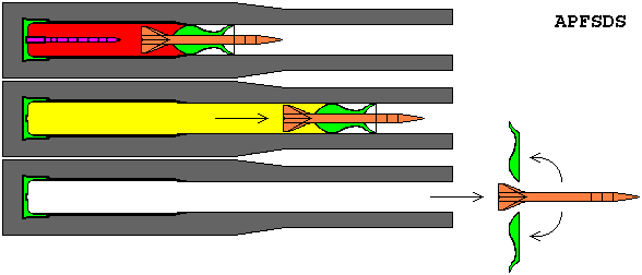 APFSDS Panzerbrechendes, endstabilisiertes Treibkäfiggeschoss, APFSDS bedeutet Armor Piercing Fin-Stabilized Discarding Sabot. Gezeichnet am 24. September 2005 mit Hilfe von Microsoft Paint Benutzer:Karl Bednarik Andere Versionen: keine Copyright Status: GNU Freie Dokumentationslizenz